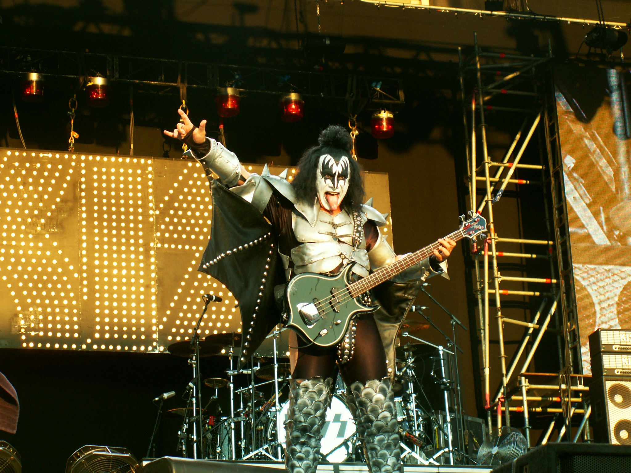 Gene Simmons - Nijmegen 2008